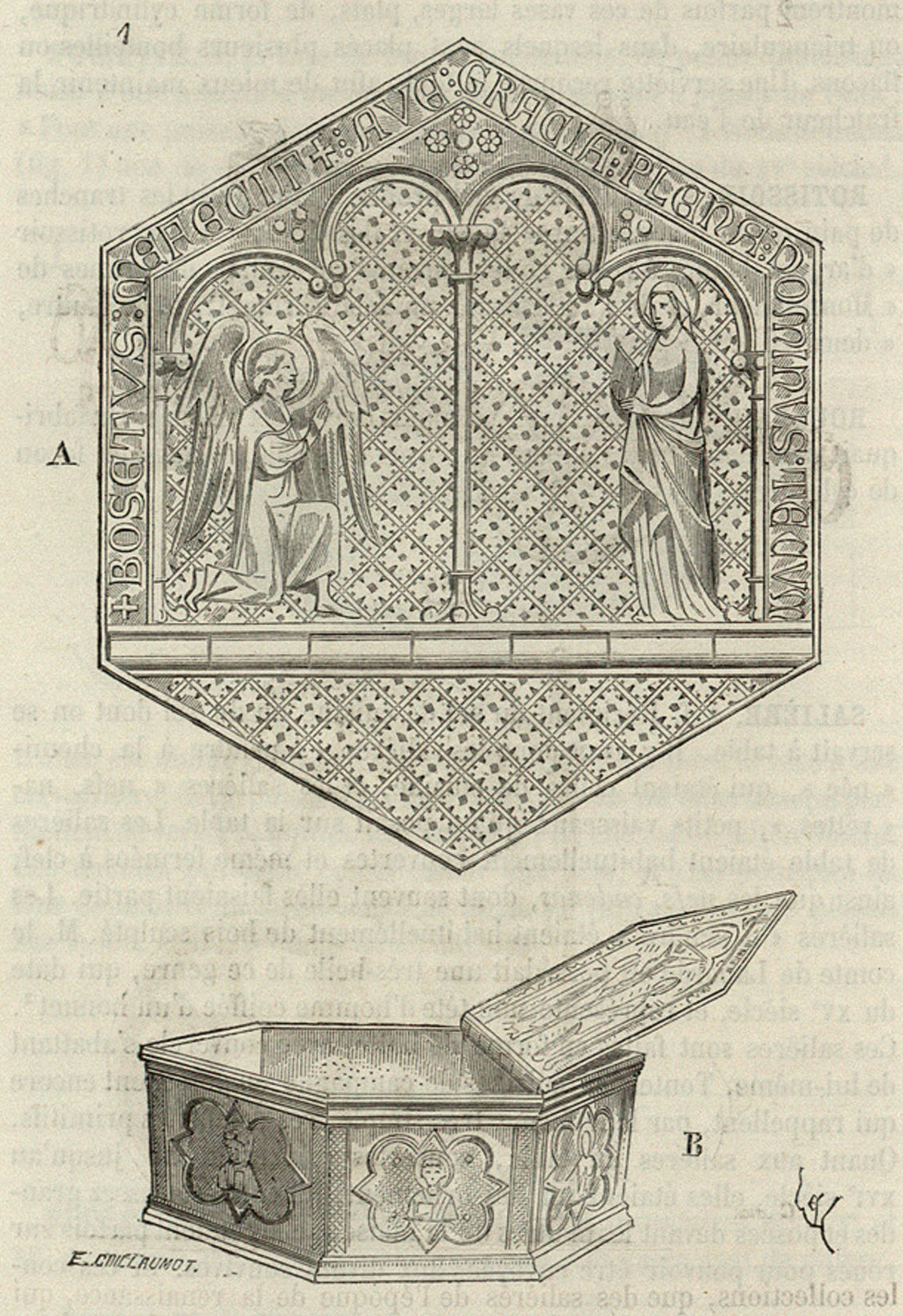 Draufsicht und Seitenansicht eines sechseckigen Behälters, der sich in der Sammlung des Musée de Cluny in Paris befindet